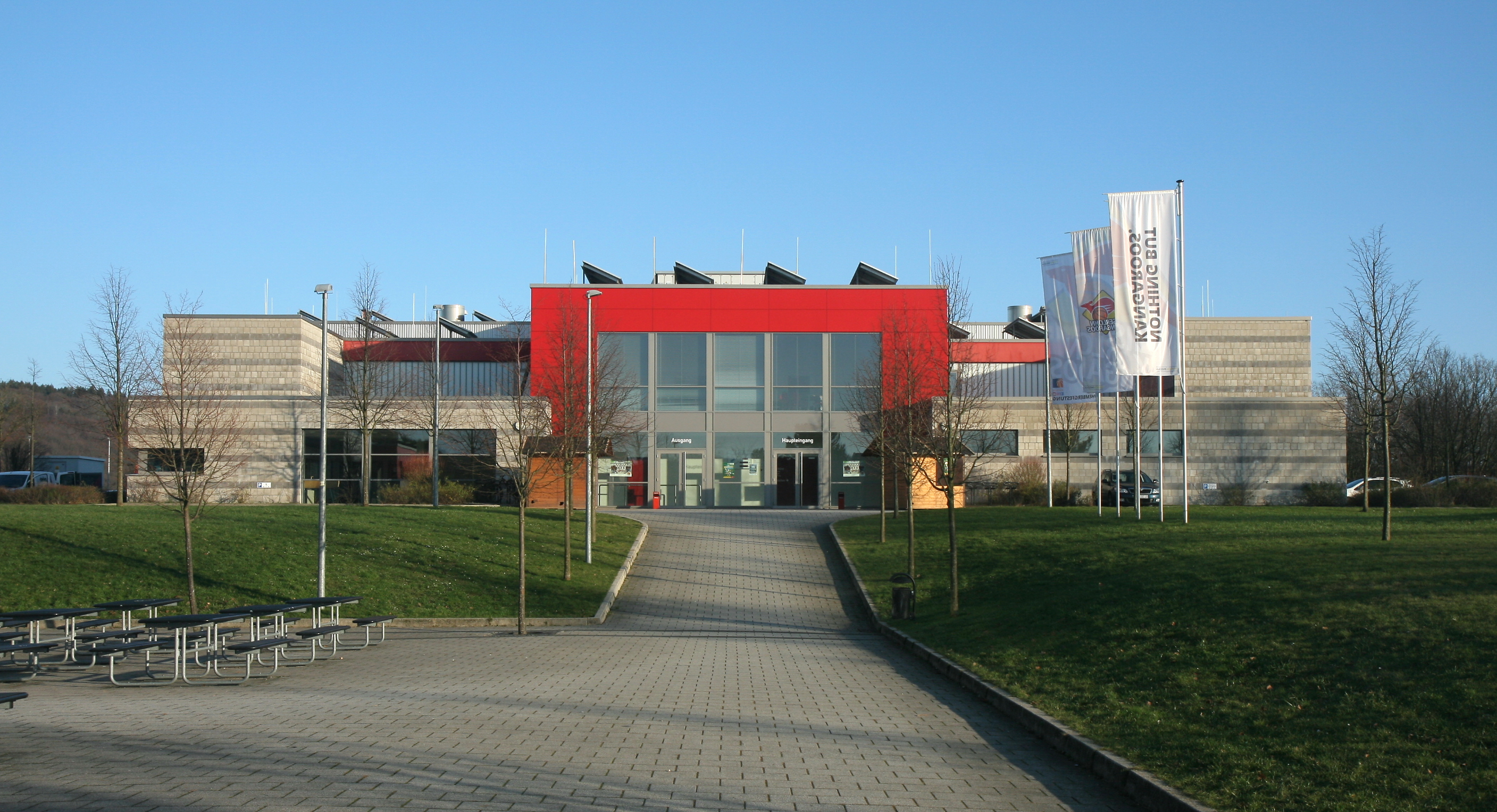 Matthias-Grothe-Halle, Alexander-Pfänder-Weg 7-9 in Iserlohn.